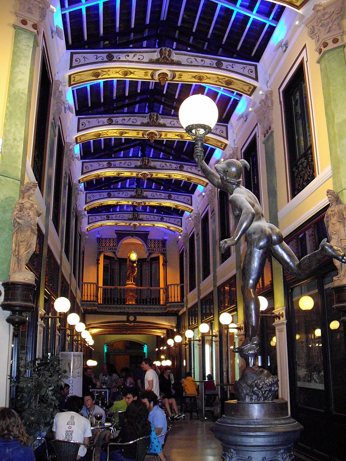 Fotografía nocturna del pasaje Gutierrez en la ciudad de Valladolid, Castilla y León, España